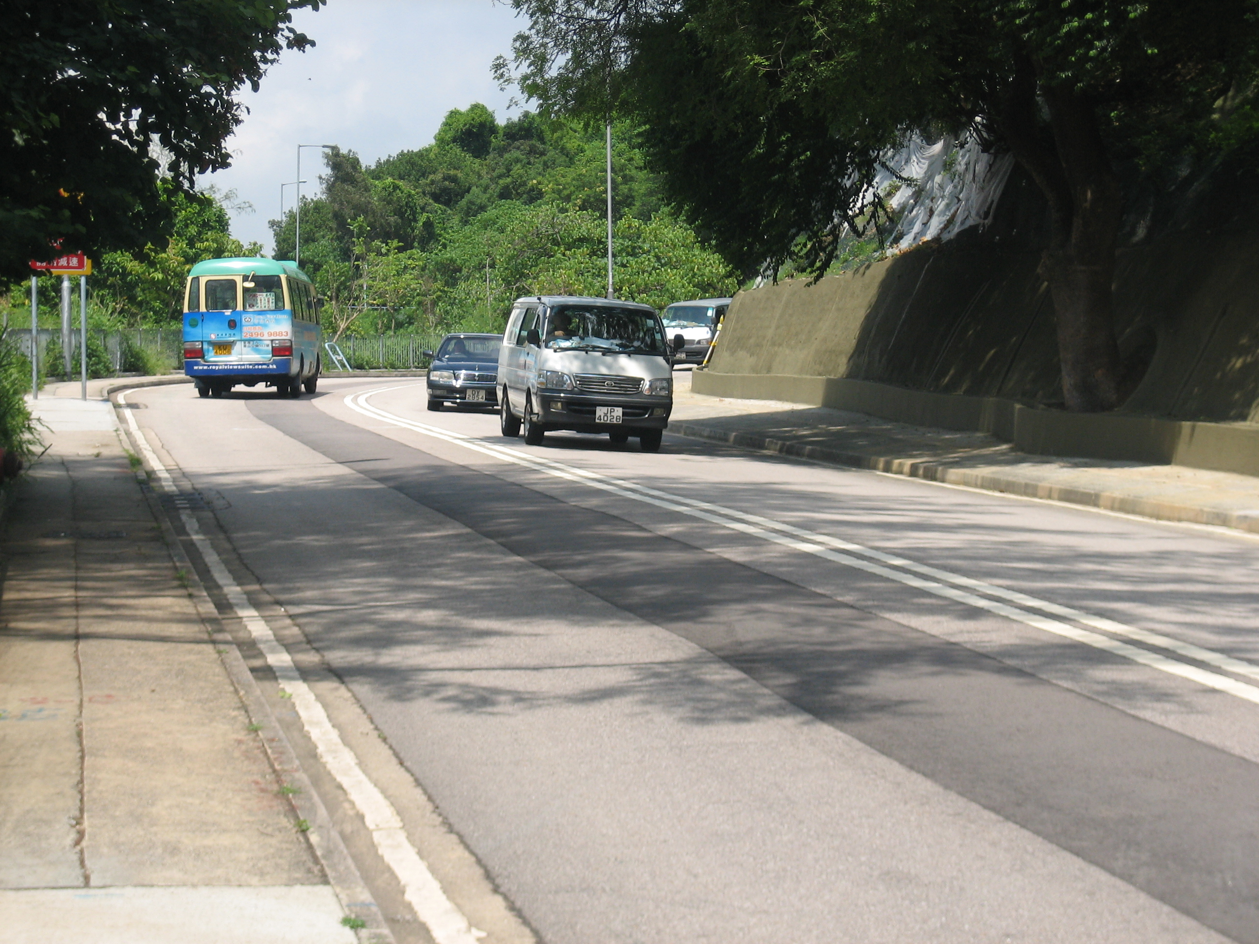 荃锦公路